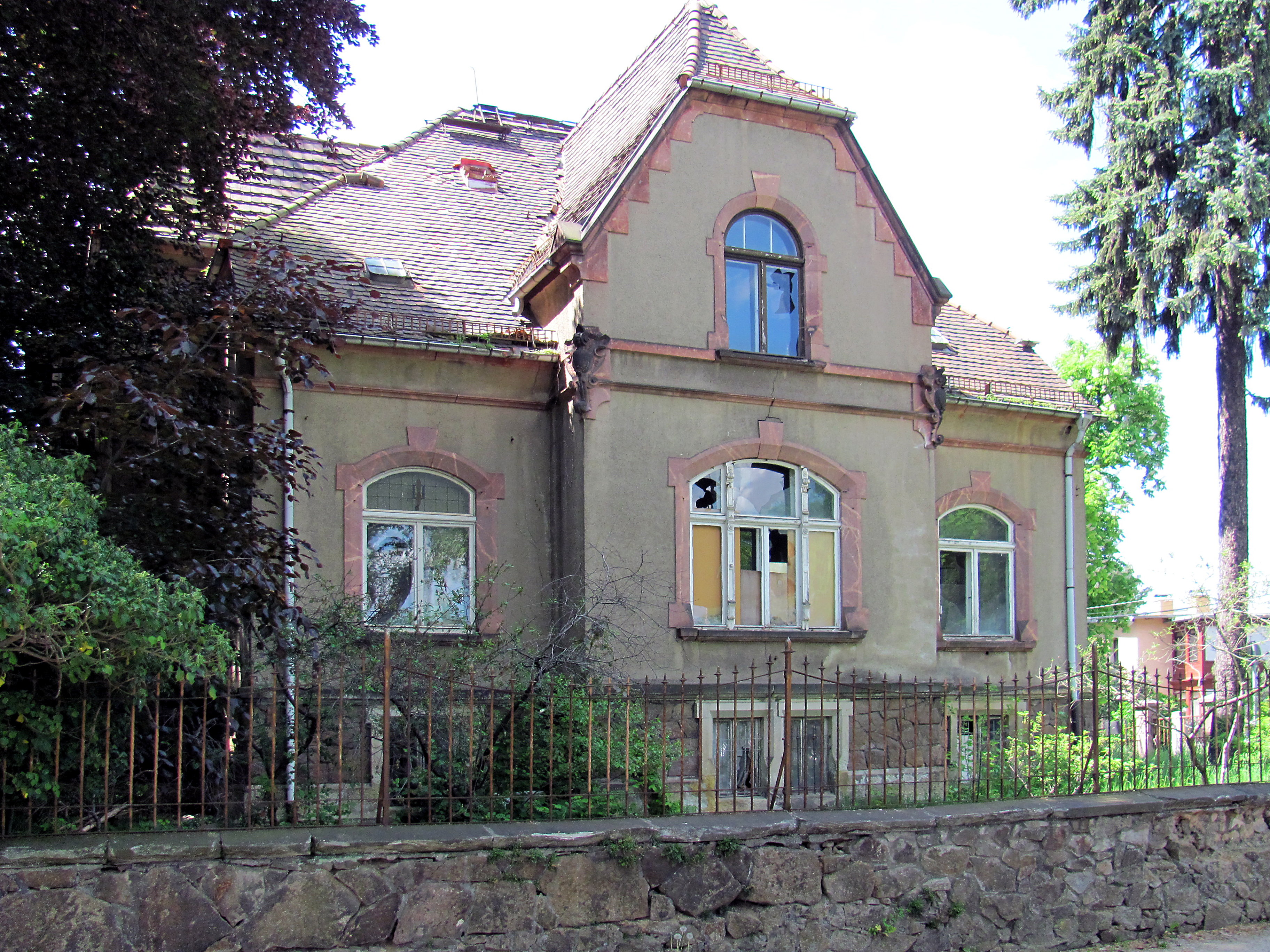 Radebeul-Niederlößnitz, Villa Heimburg, von der Zillerstraße aus